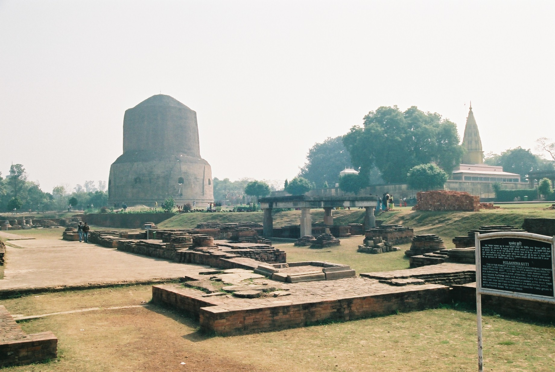 The deer park in Sarnath where Gautama Buddha first taught the Dharma 佛教の八大聖地の一つ、初転法輪の地サールナート（鹿野苑）。 遺跡はたくさん残っているし、今も適当ではあるけれど修復作業も進んでいます。でも、案内図や説明書きが無いから、何が何だか分らないのが難点。 (2005/01/27 Sarnath, Uttar Pradesh, INDIA)